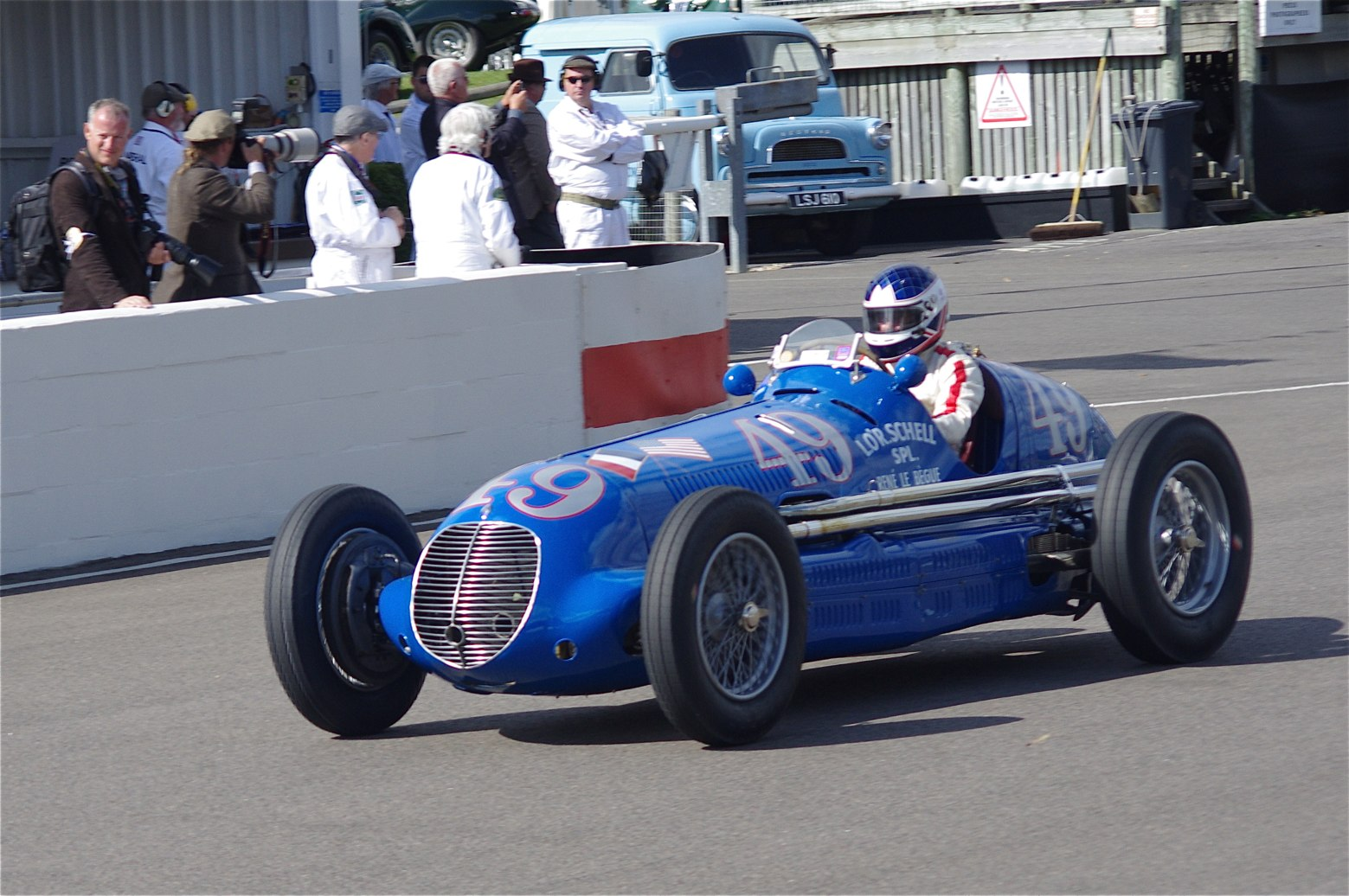 Goodwood Revival 2012